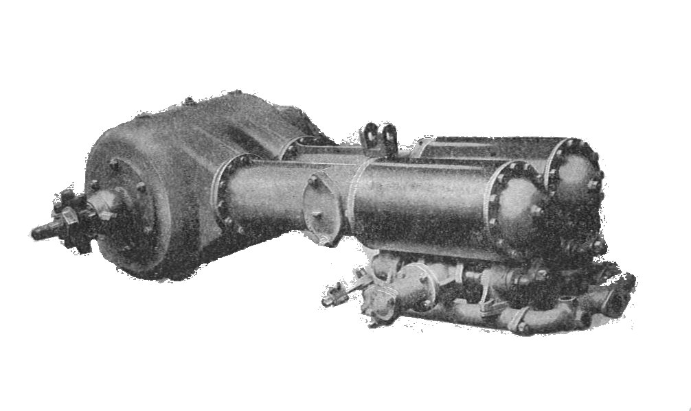 Sentinel steam waggon engine (Rankin Kennedy, Modern Engines, Vol V).jpg